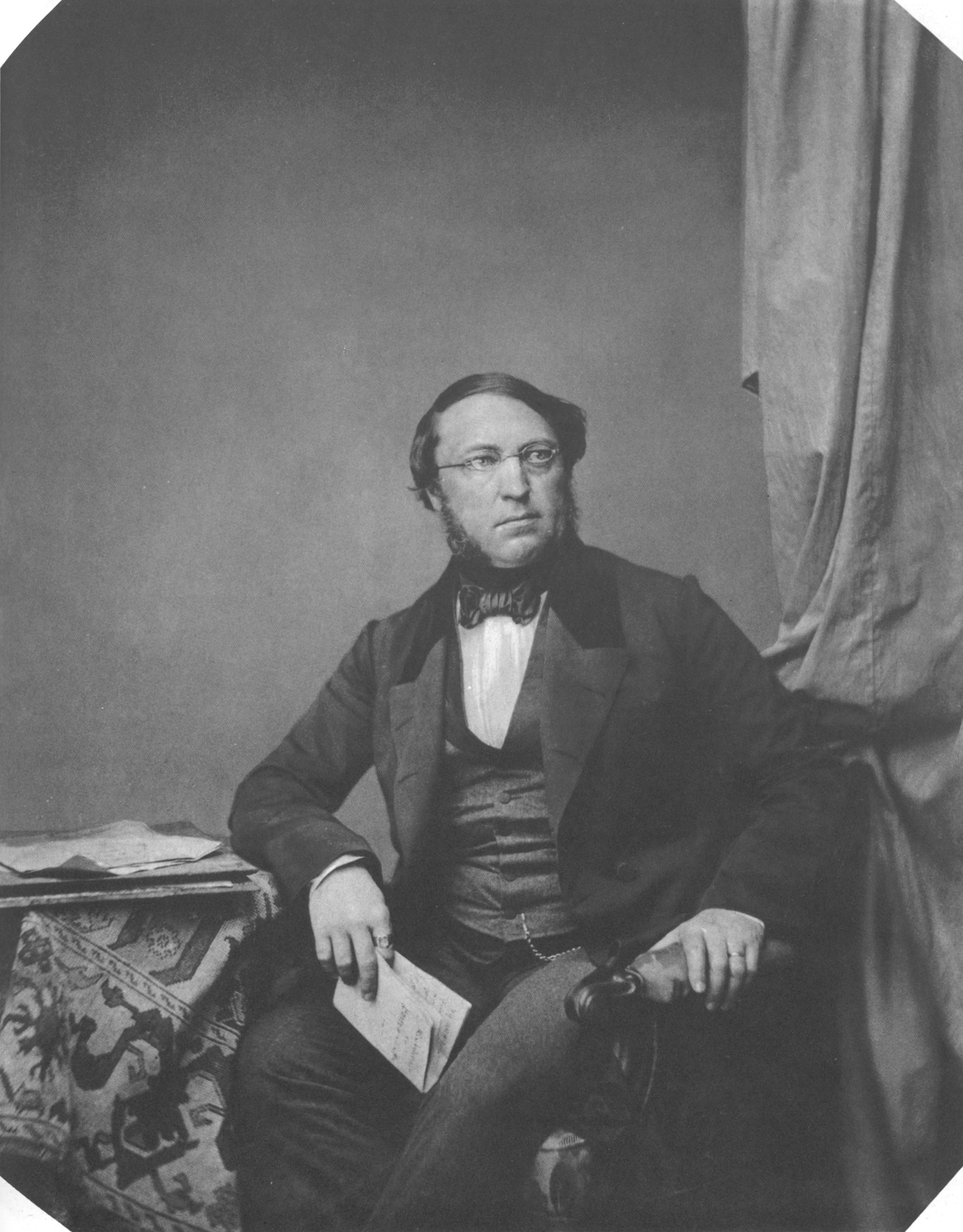 Ludwig Freiherr von der Pfordten (1811-1888)